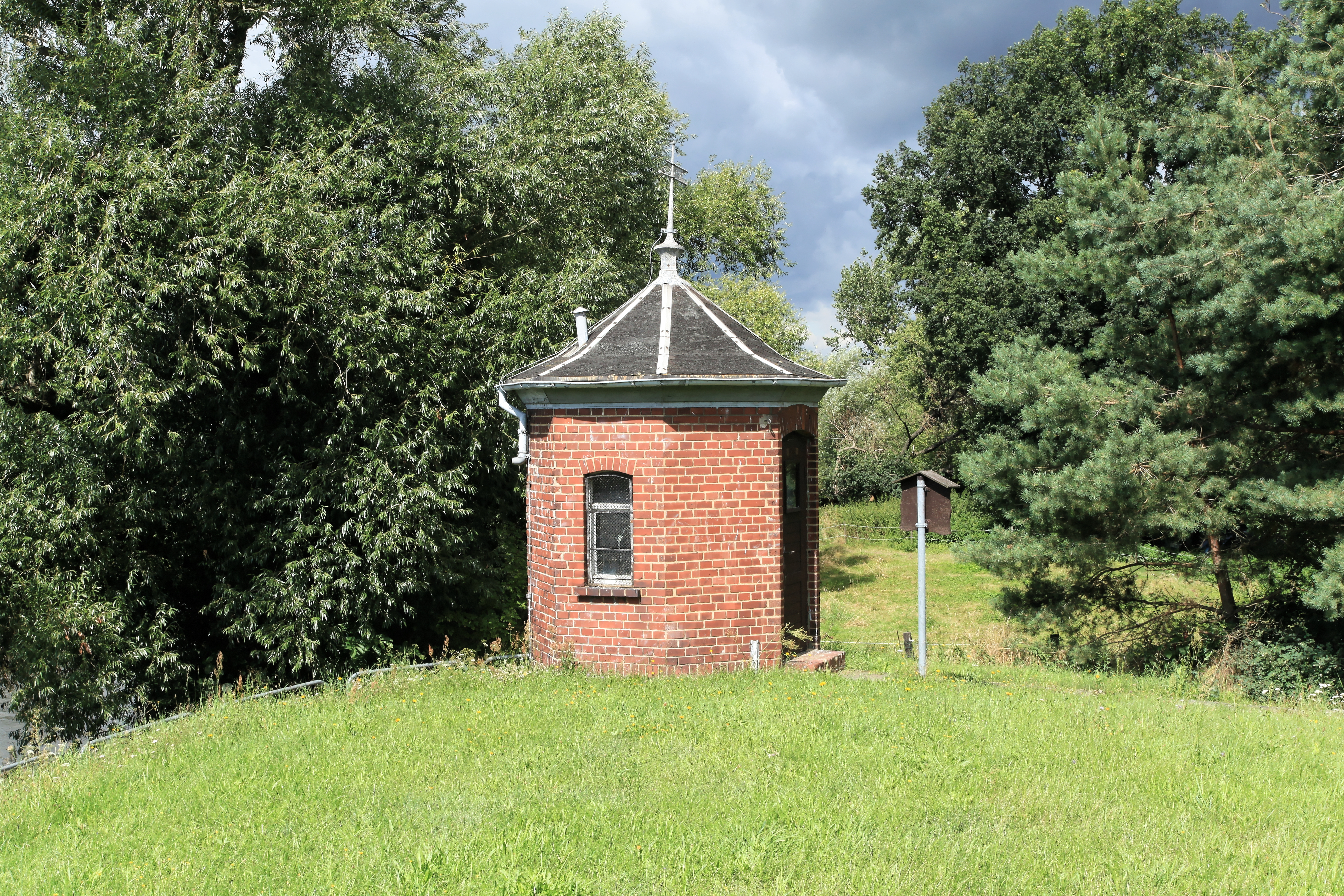 Altes Pegelhaus, Leipziger Straße in Bad Düben)